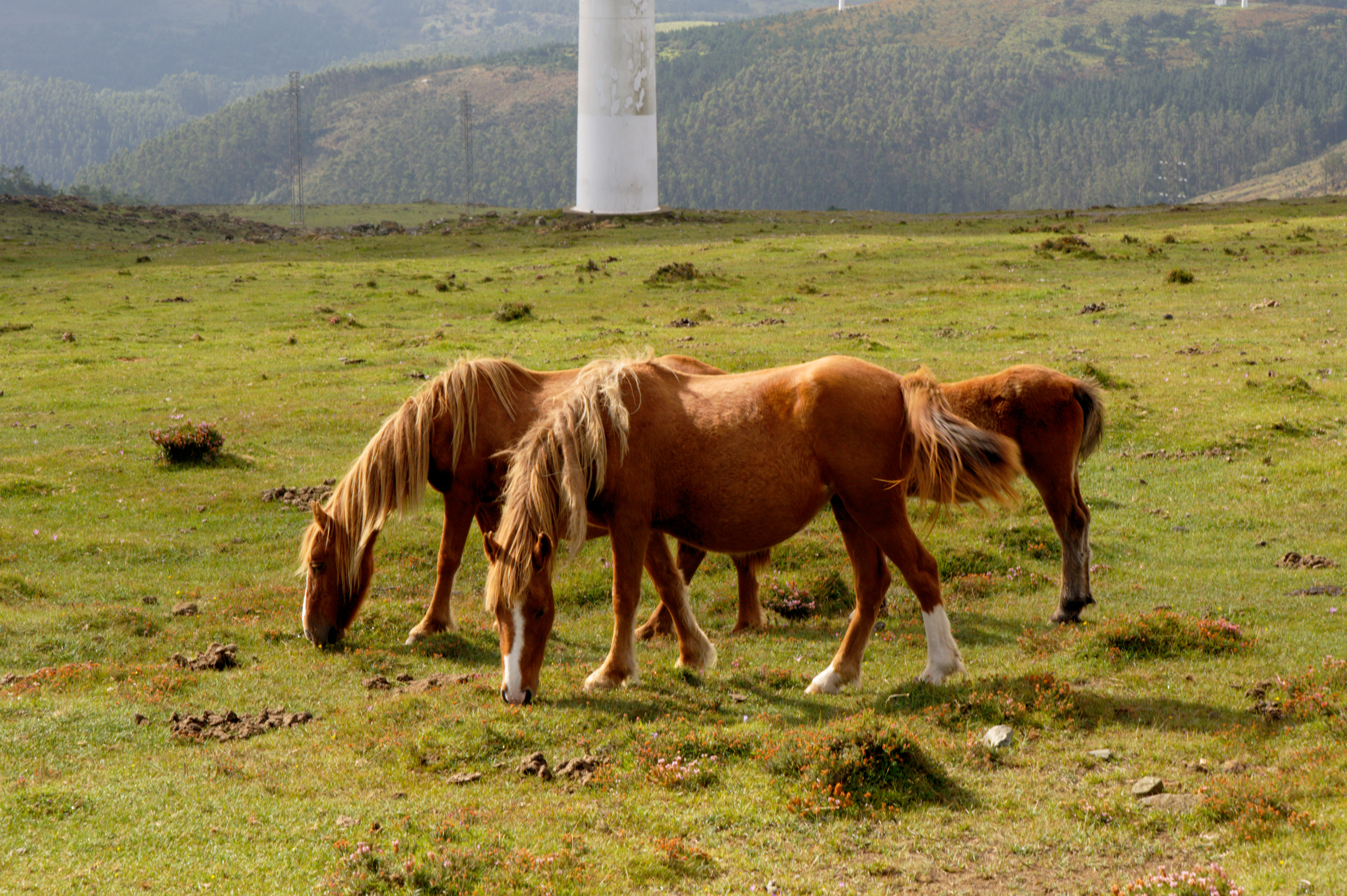 Frei laufende Pferde auf der Serra da Capelada